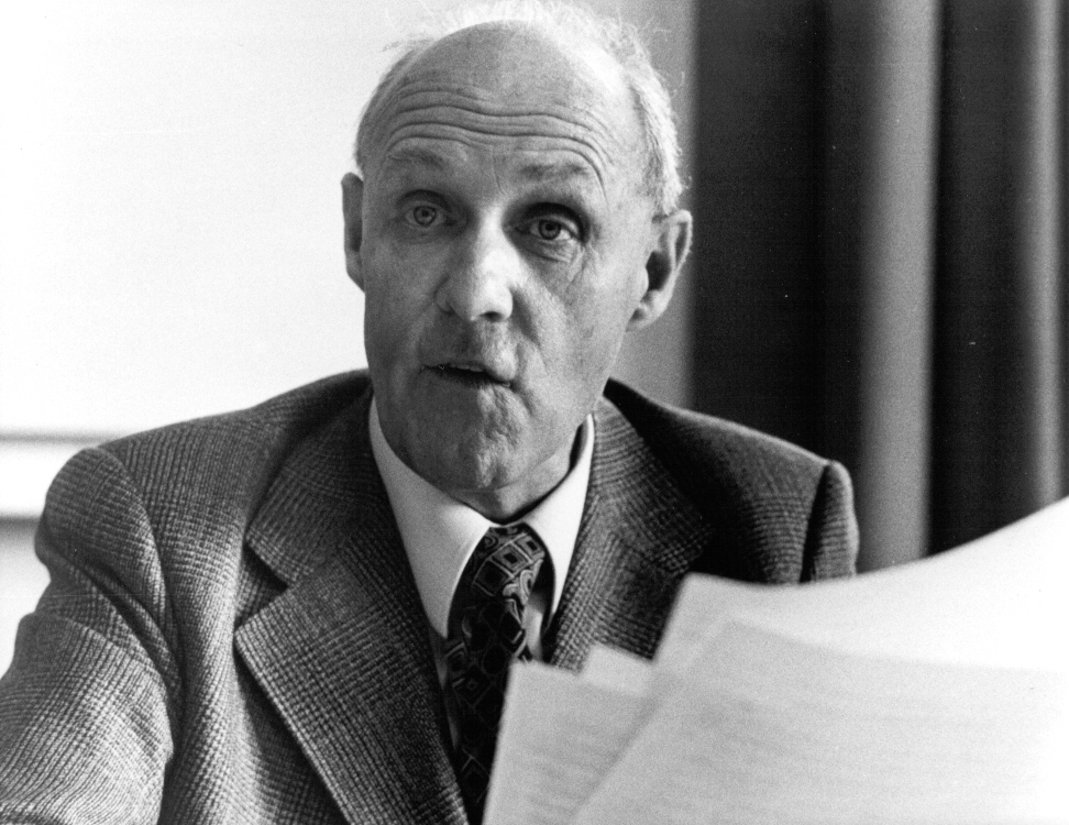 Erich Gruner, Schweizer Politikwissenschafter und Historiker